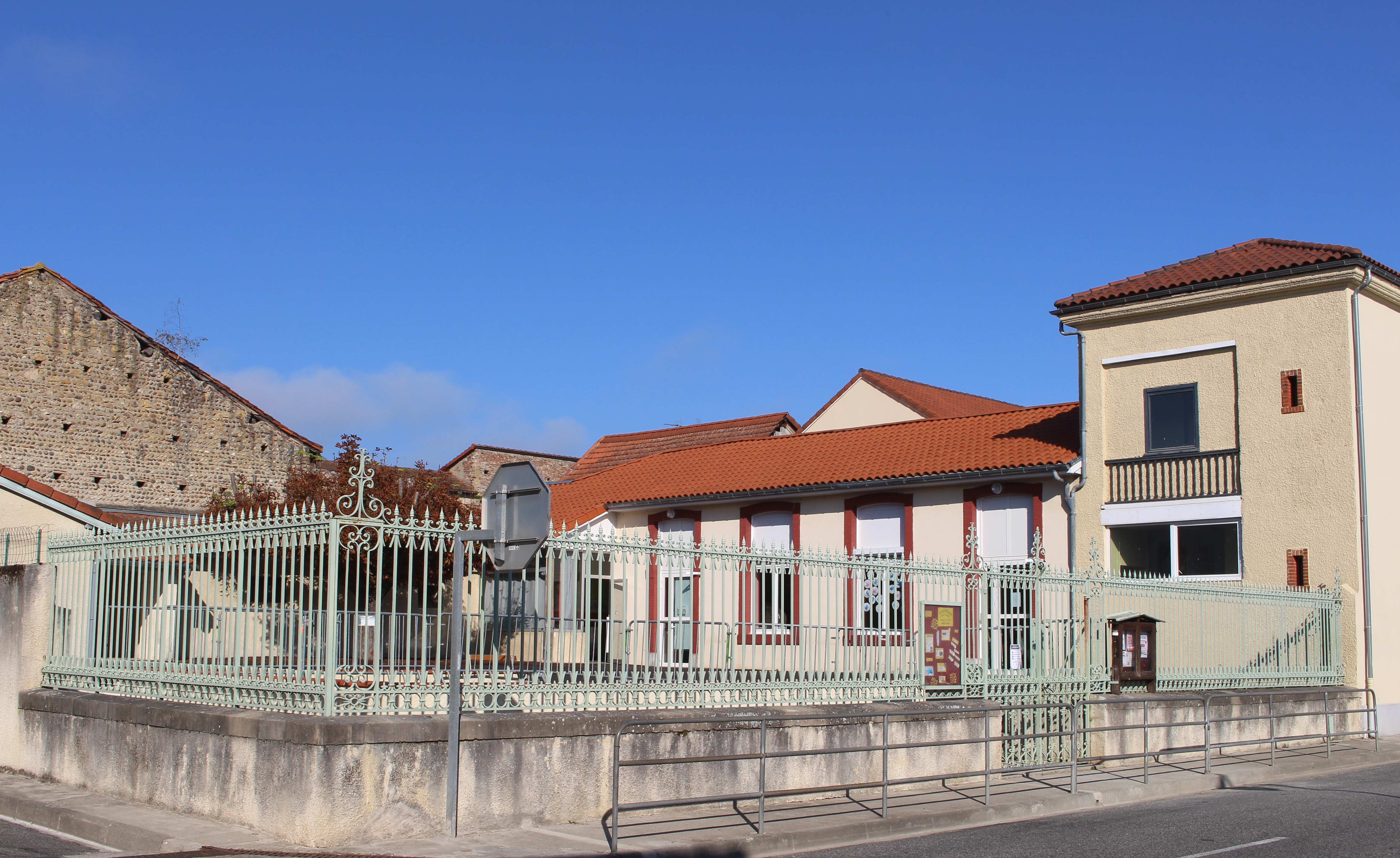 École de Rabastens-de-Bigorre (Hautes-Pyrénées)